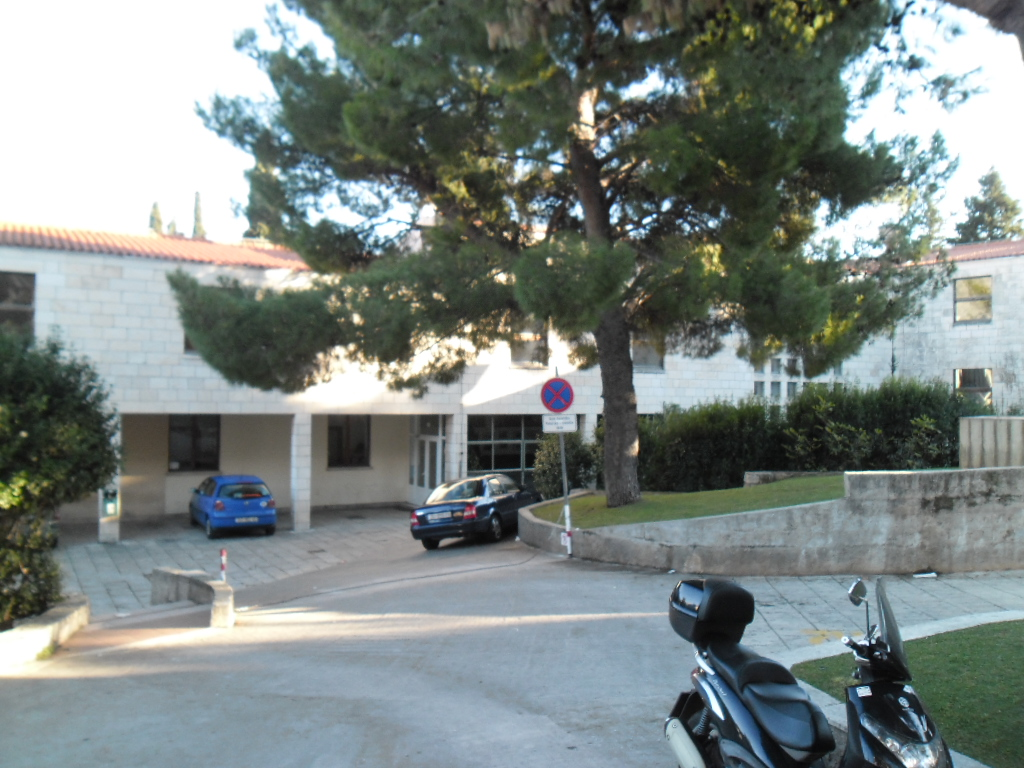 ulaz u zgradu Pomorsko-tehničke škole Dubrovnik